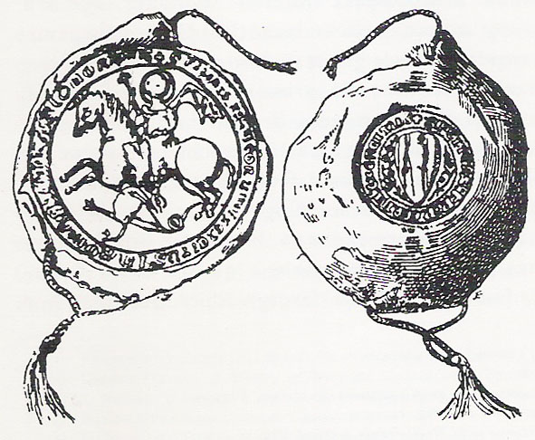 Seal of the Catalan Grand Company (1305) En cera verge vermella; Anvers: (Sant Jordi) Sigillum felicis exercitus francorum in Romanie parti comorantis / Revers: (Quatre Pals) Sigillum felicis exercitus francorum // Alternate names in other documents: Felix Francorum exercitus in Romanie finibus comorans // Felix Francorum exercitus in Romania // Universitas felicis Francorum exercitus in partibus imperit Romanie // societatis exercitus catalanorum // Societas Catalanorum quae et Universitas fœlicis Francorum exercitus existentis in partibus imperii Romania // filiis societati cathalanorum conmorantium in partibus Romanie.